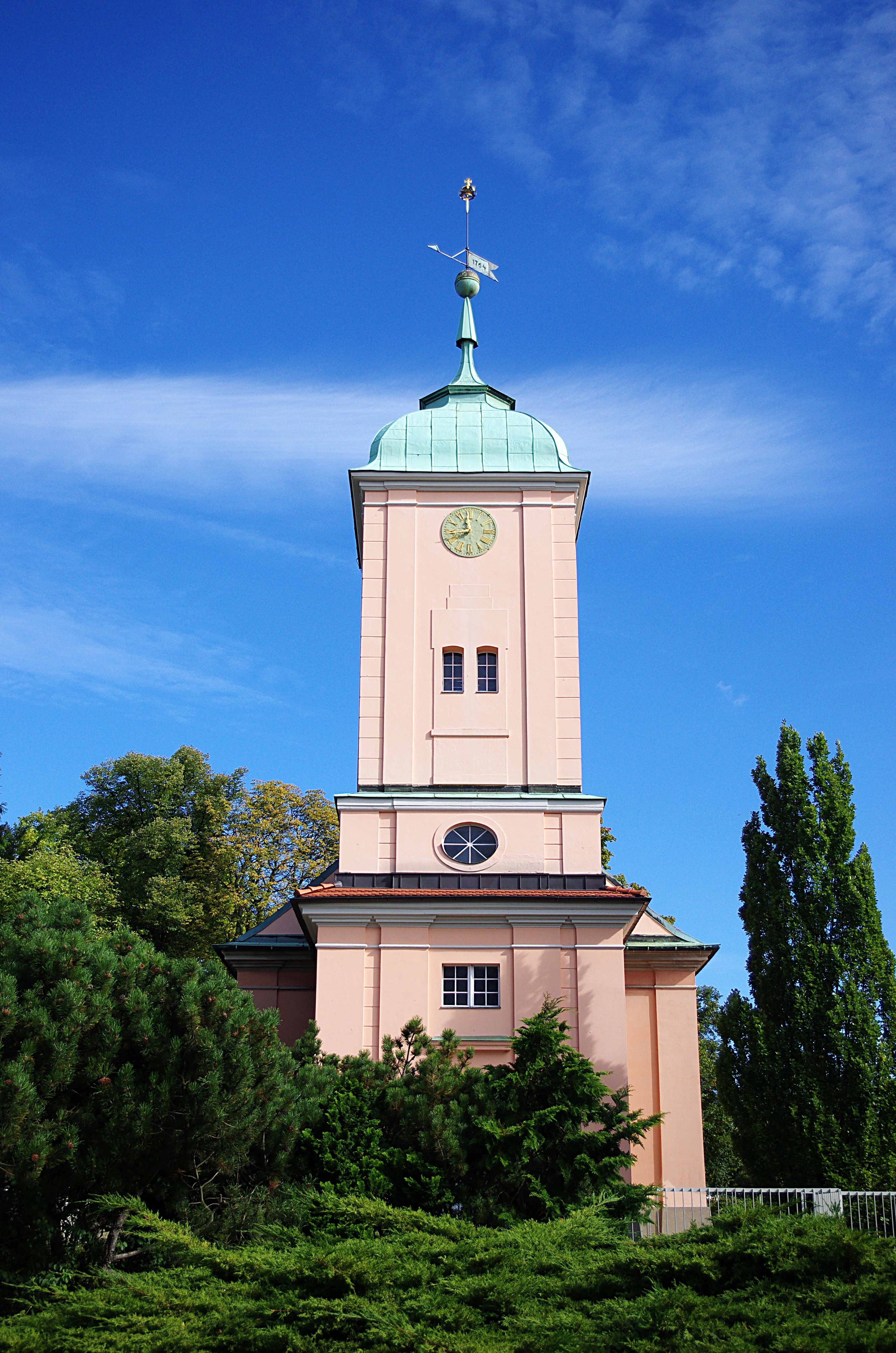 Die Dorfkirche Schöneberg steht unter Denkmalschutz. Sie befindet sich an der Hauptstraße in Schöneberg. Sie wurde von 1764–1766 von Johann Friedrich Lehmann erbaut.This is a photograph of an architectural monument.